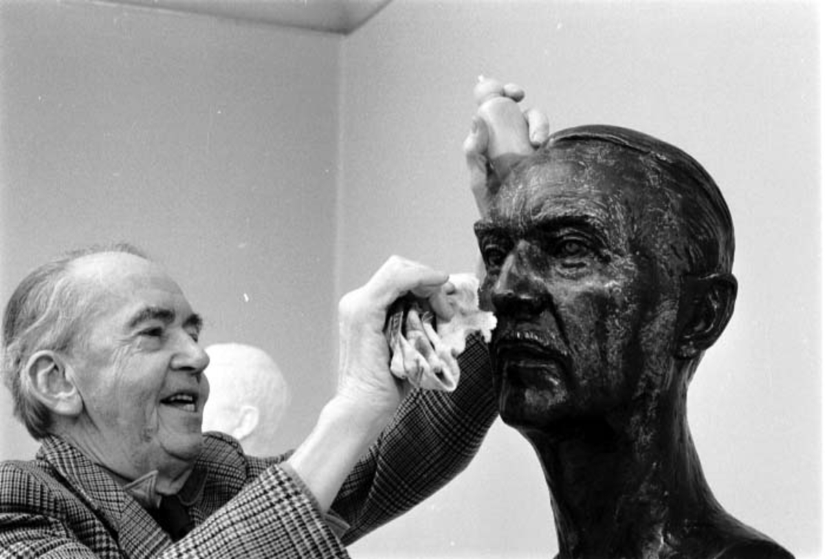 Billedhuggeren Arne Durban med sin portrettbyste av Henrik Groth.